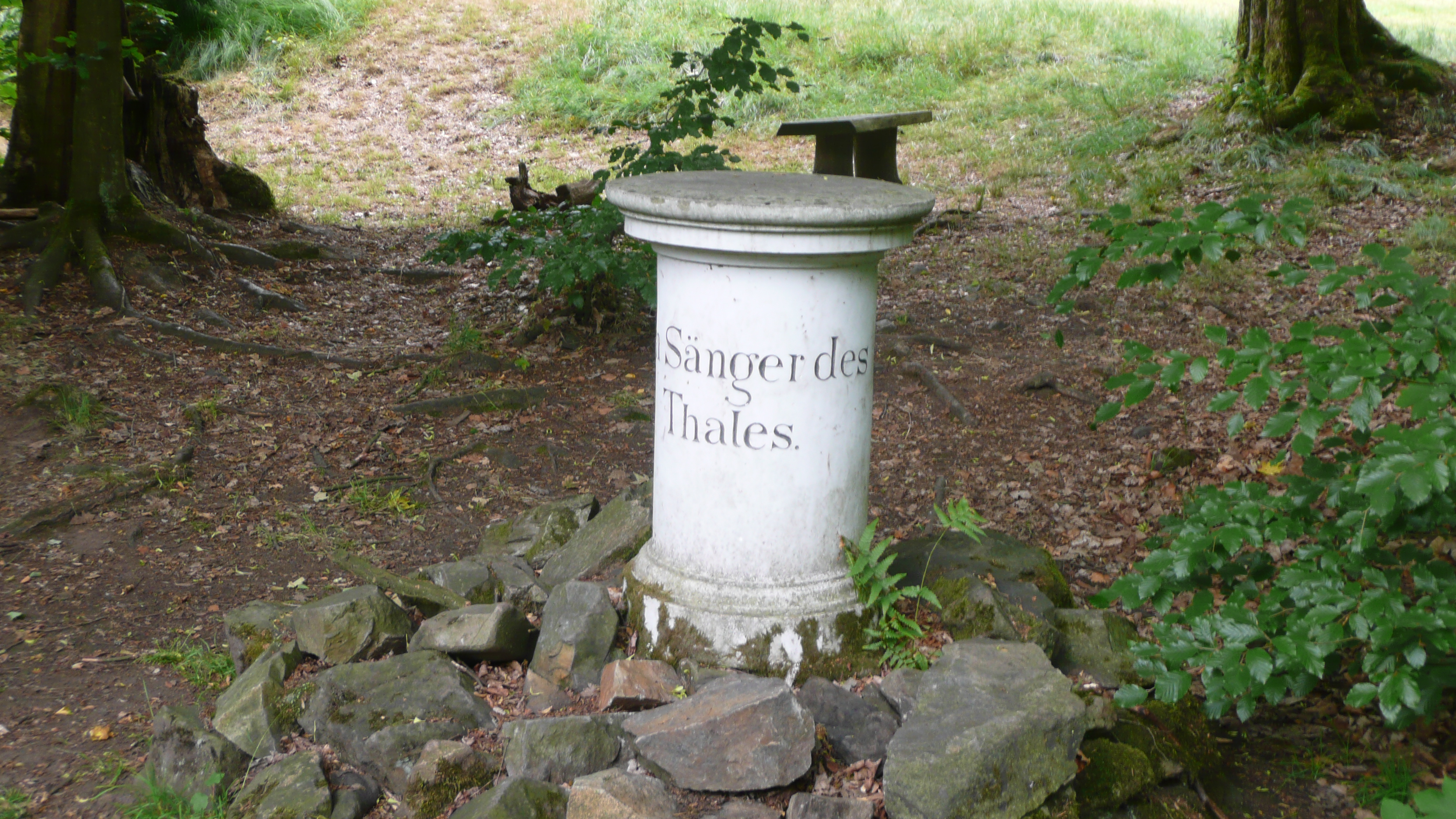 Denkmal "Dem Sänger des Thales" im Seifersdorfer Tal in Sachsen